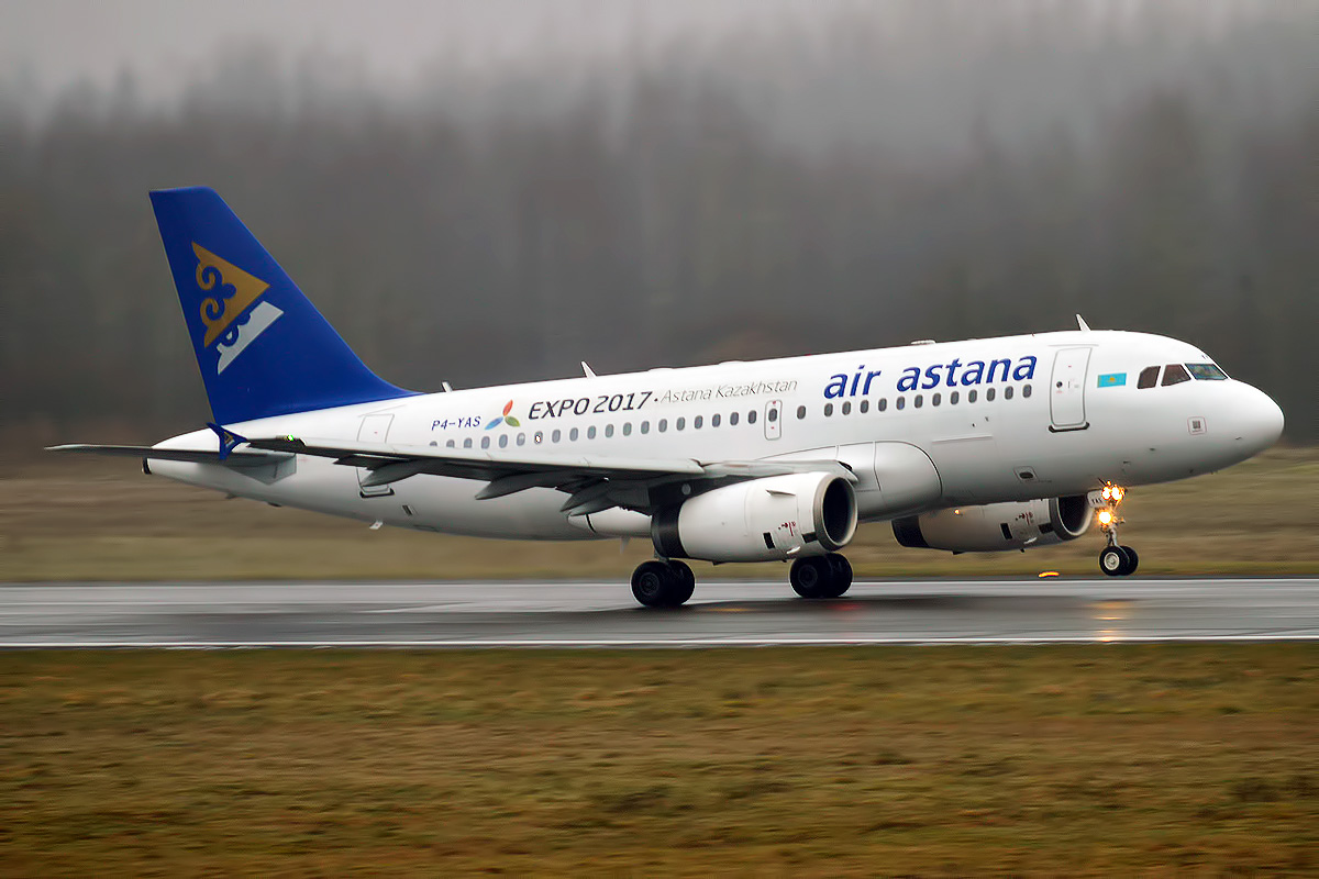 Air Astana, P4-YAS, Airbus A319-132